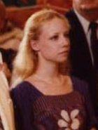 Amanda McKerrow